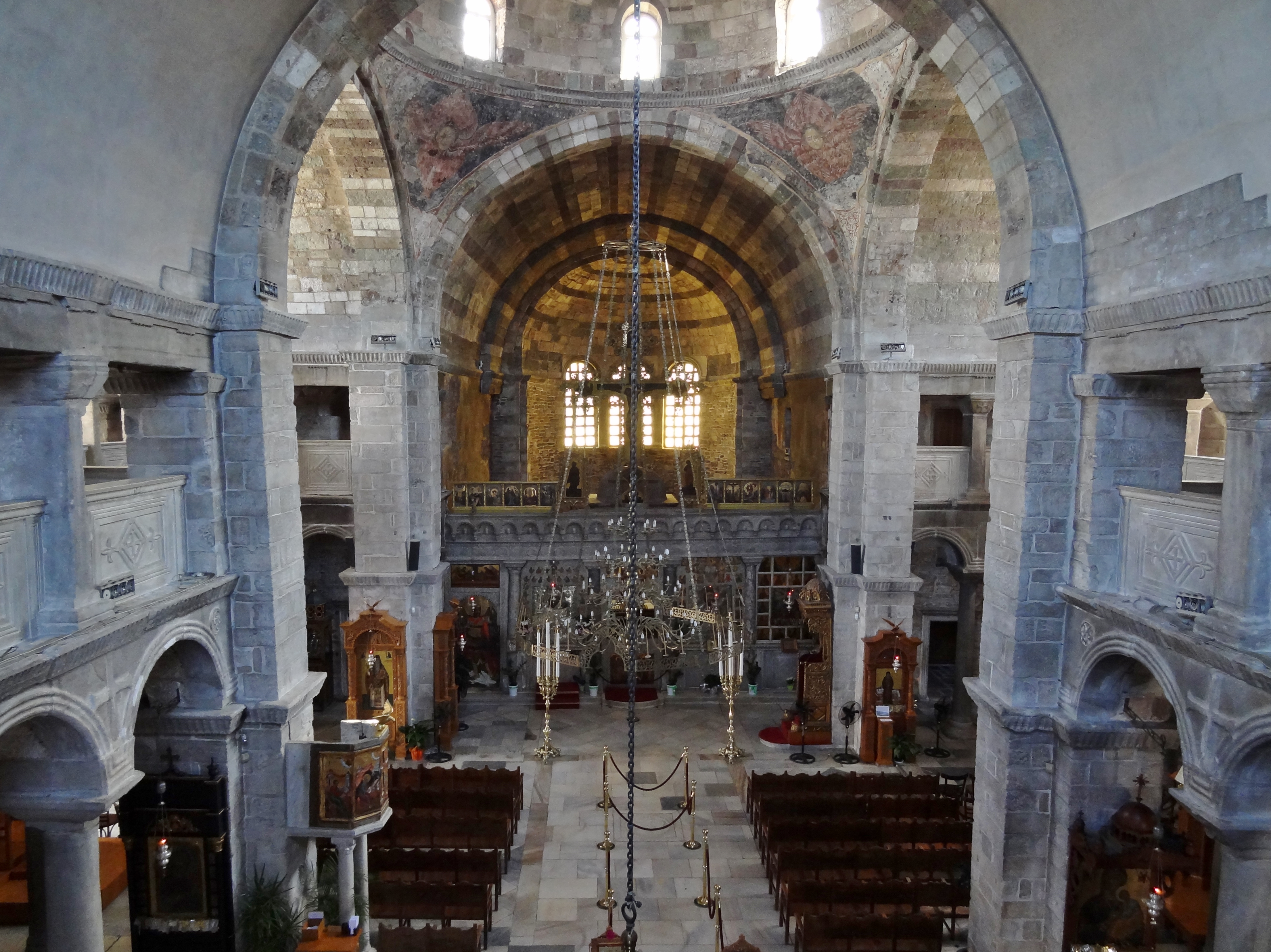 Hauptschiff der Panagia Ekatontapyliani in Parikia auf Paros, Kykladen, Griechenland